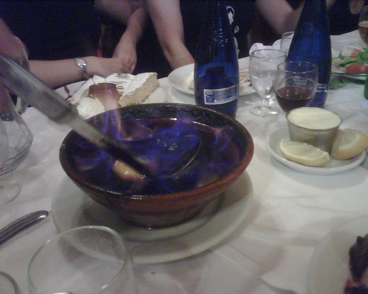 Pequena queimada, feita após a sobremesa. After-dinner preparation of a little queimada.